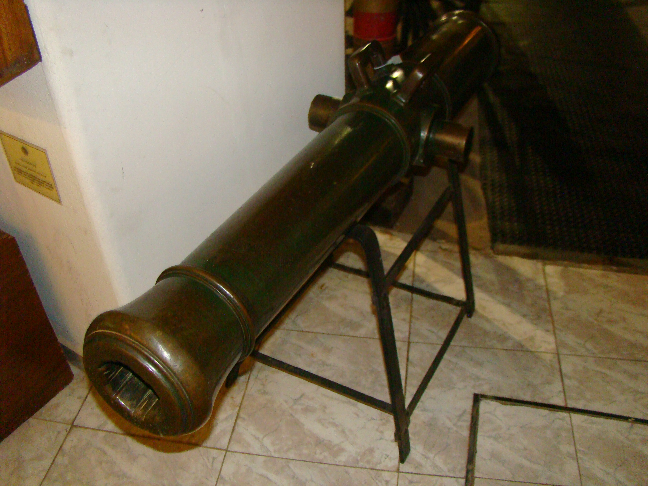 Cañon de campaña Manco Capac 1814 (Museo de Armas de la Nación)